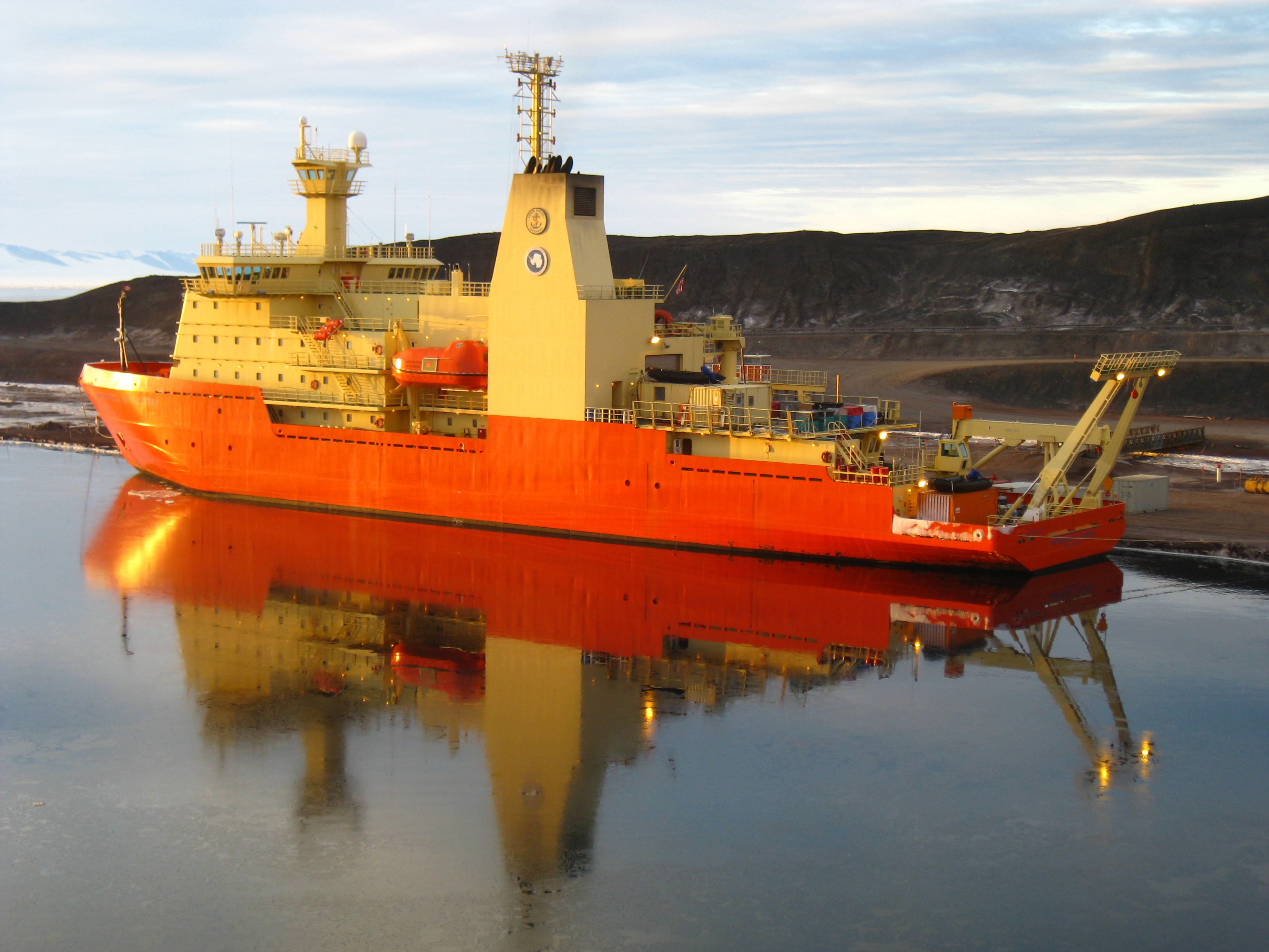 Antarctica Nathaniel B Palmer